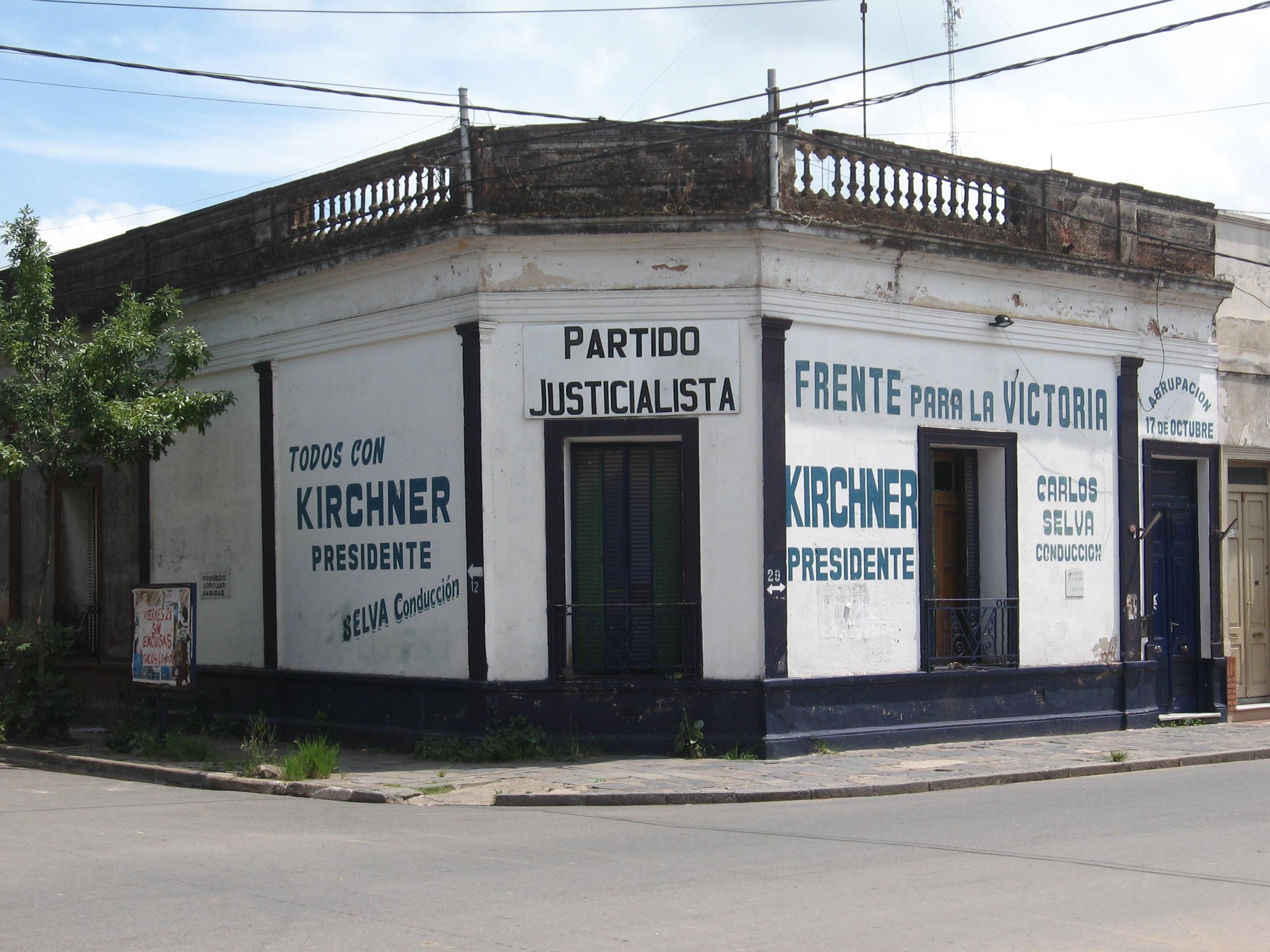 Local partidario del Partido Justicialista en la ciudad de Mercedes